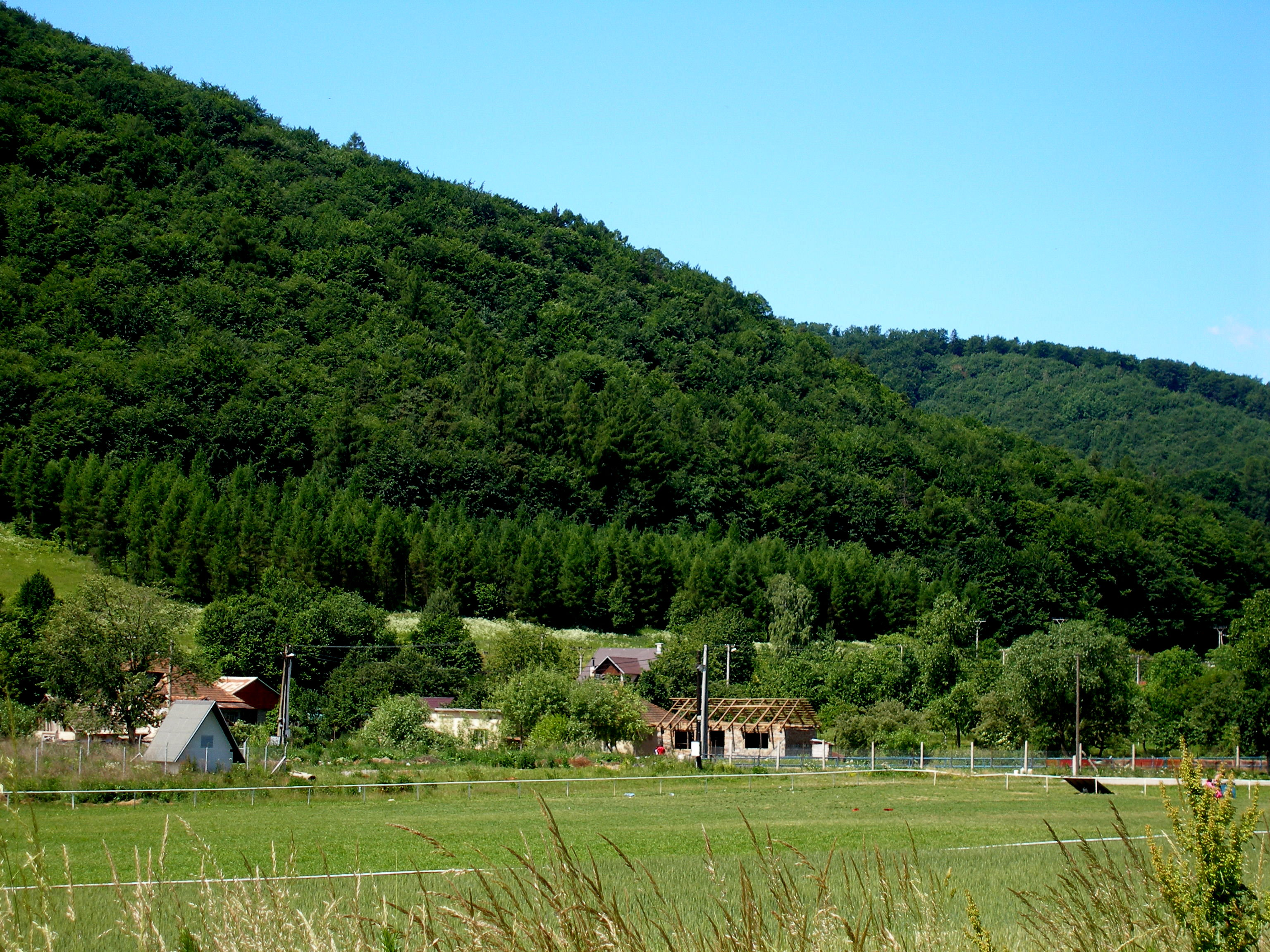 Obec Uzovské Pekľany okres Sabinov